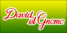 David el Gnomo es una serie de dibujos animados de origen español, emitida por primera vez en 1985, que narra las aventuras en el bosque del gnomo David y su familia, con un importante trasfondo educativo en temas como ecología, amistad y justicia.